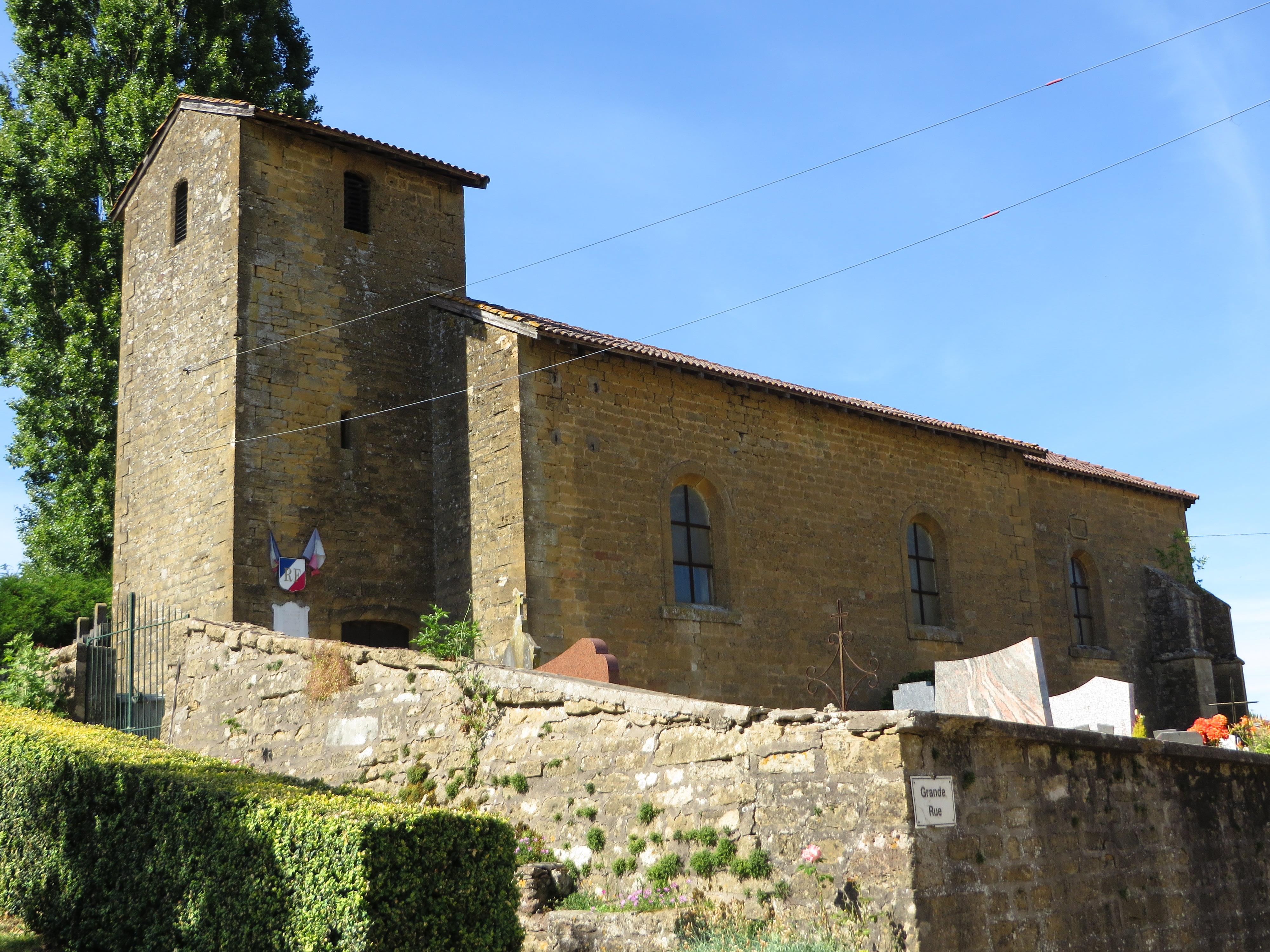 Flassigny Église Saint-Martin